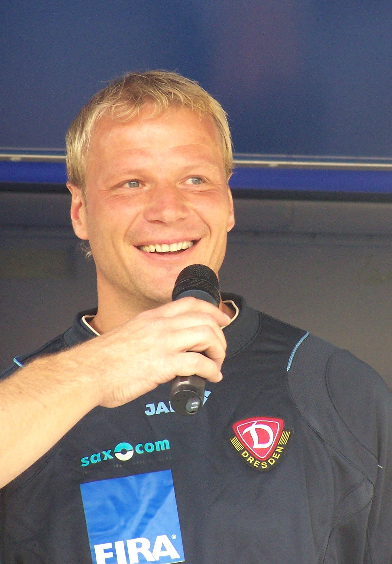 Co-Trainer Jan Seifert bei der Teampräsentation von Dynamo Dresden zum Start der Drittliga-Saison 2008/09